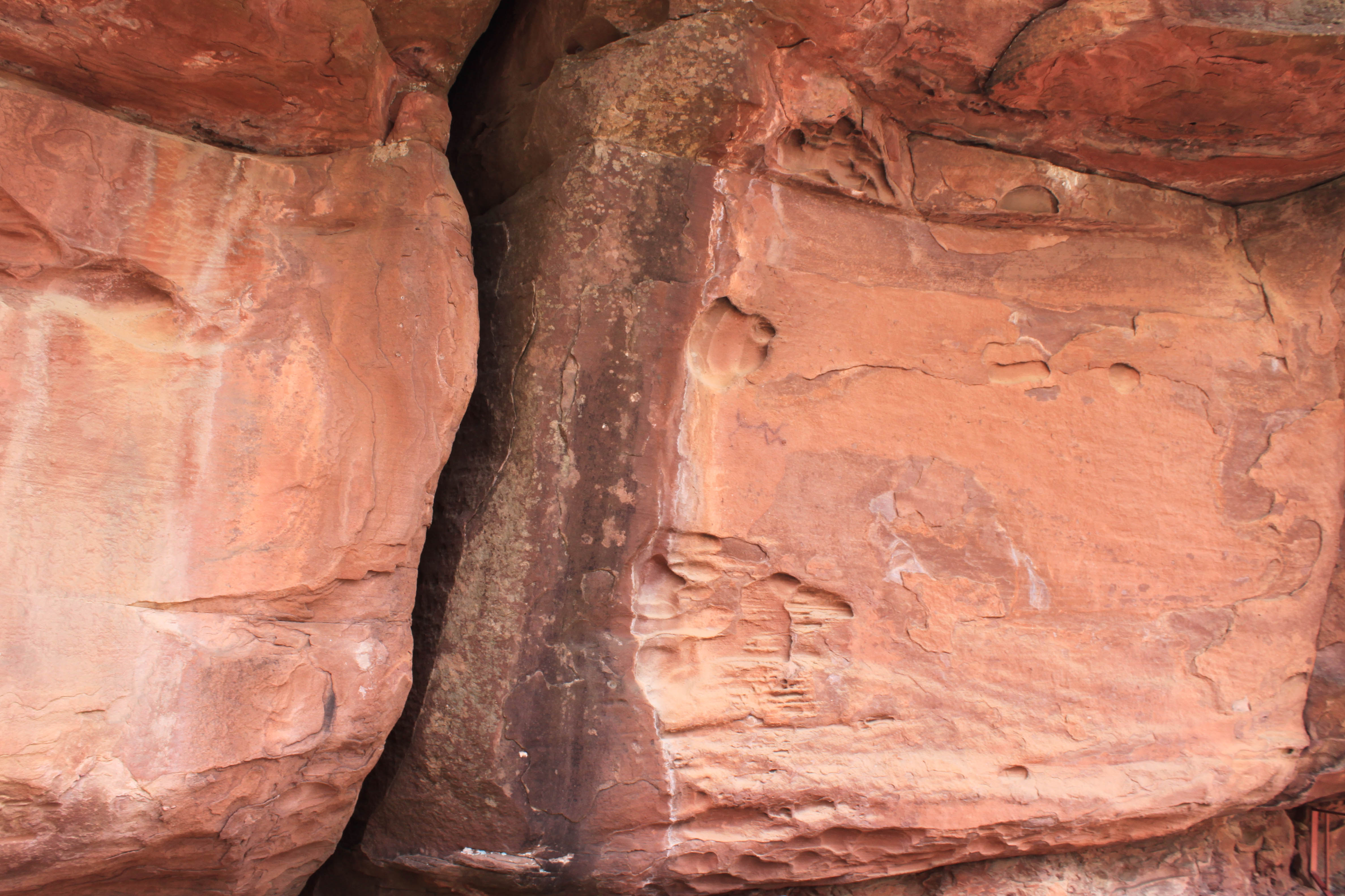 Abrigo del Arquero de los callejones cerrados situado en la Sierra del Rodeno en el término municipal de Albarracín, Teruel, España.